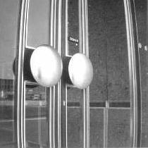 Bundesgartenschau 1957 in Köln - Zugang, Detail